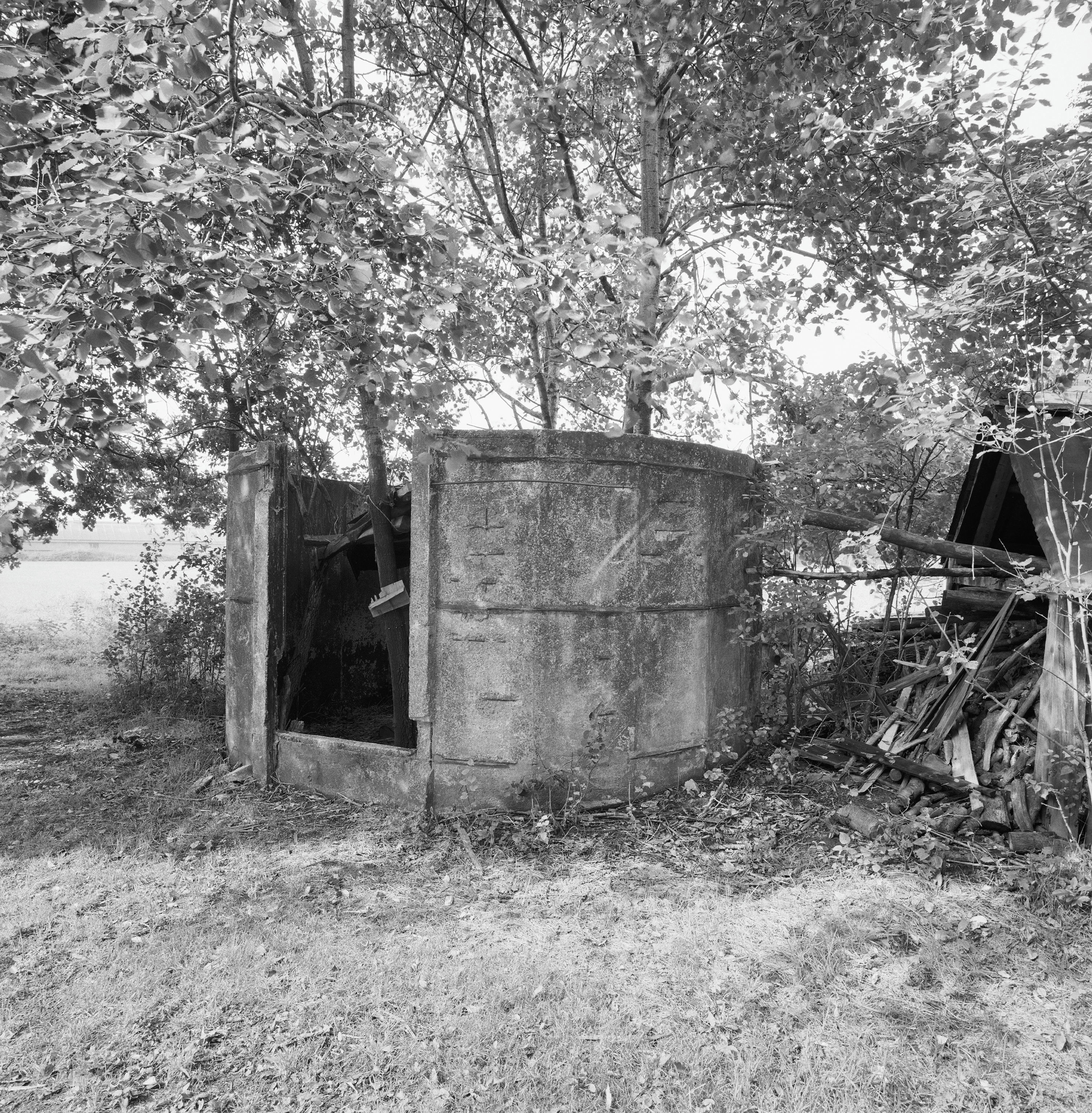 Boerderijcomplex Nieuw Altena: Overzicht betonnen silo voor kuilgras